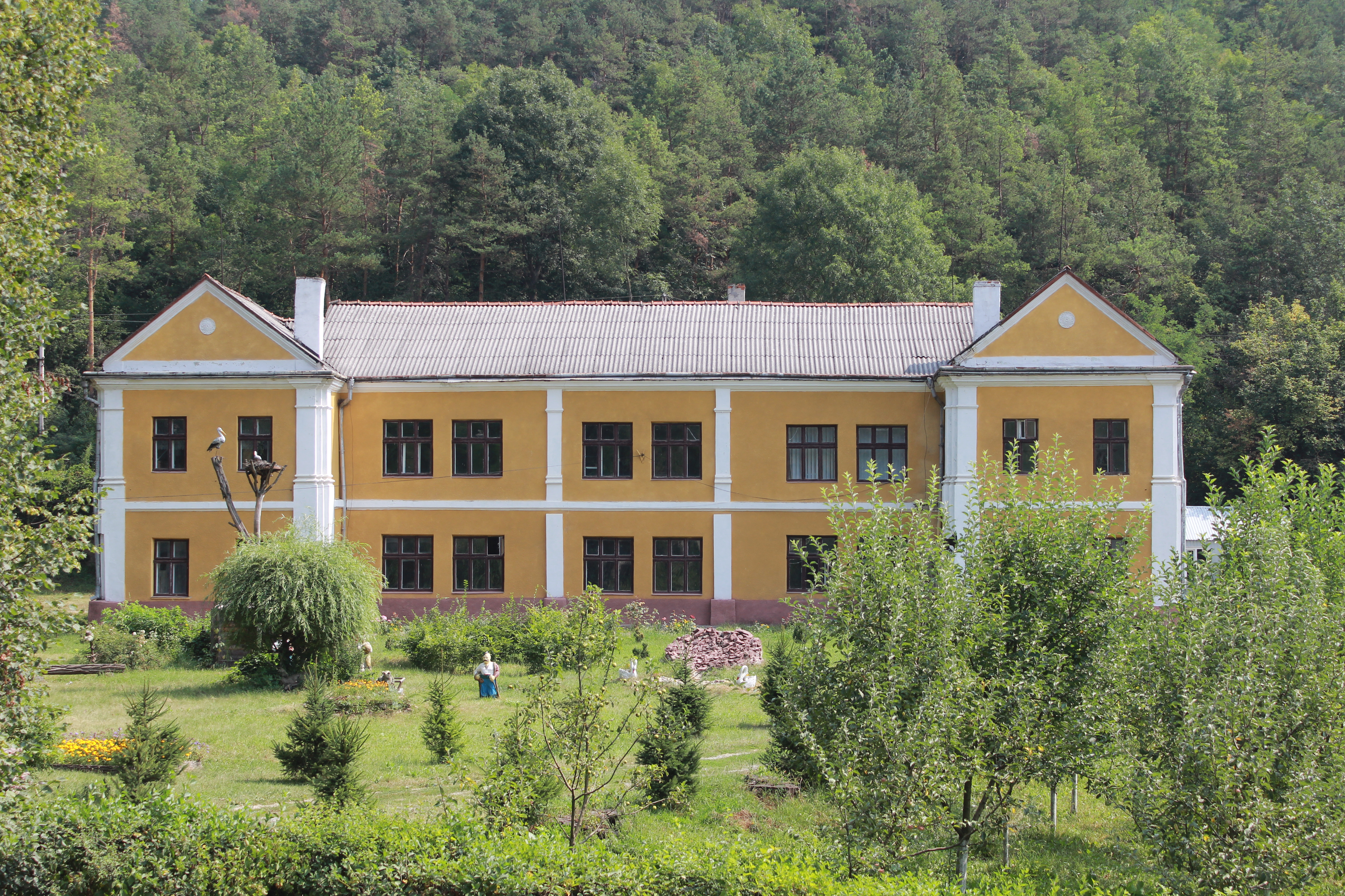 Двір Кімельманів, с. Угриньківці, Заліщицький район, Тернопільська область